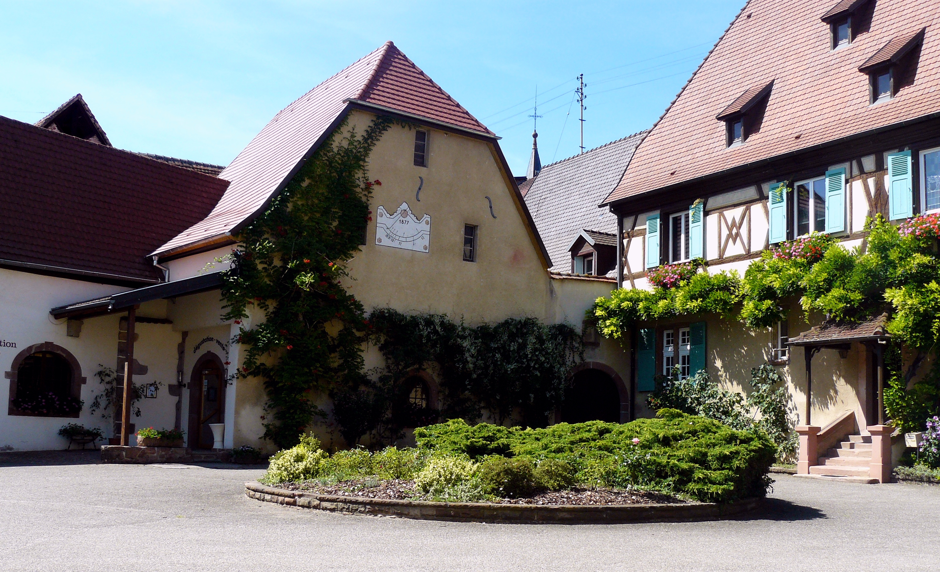 Cave coopérative et son cadran solaire de 1877